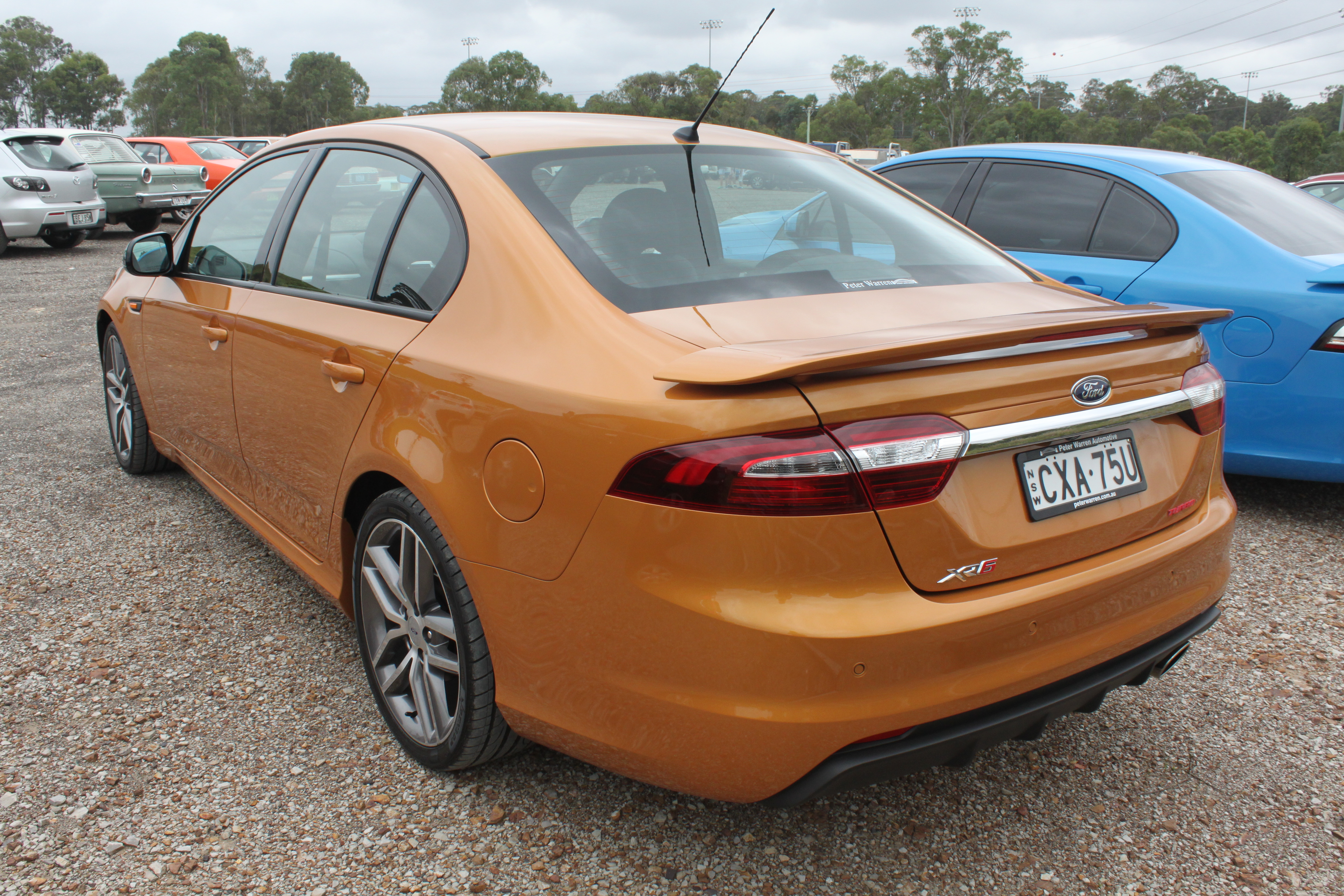 Ford Falcon FG-X XR6 Turbo